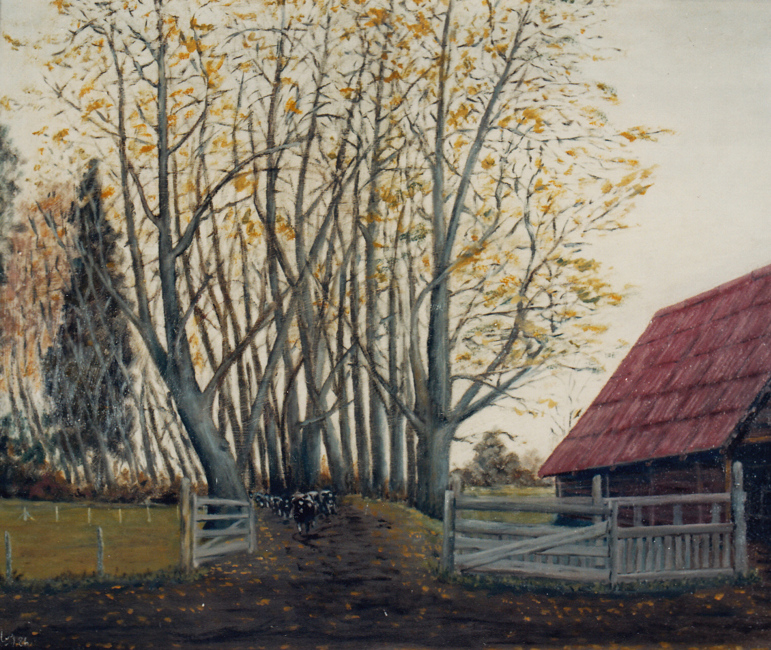 Pintura de Eugenio Cruz Vargas (1923 - 2014). Técnica: óleo sobre tela. Tema: escena en la comuna agrícola chilena de la Provincia del Ranco, en la Región de los Ríos, sur de Chile. Medidas: 100 x 80 cm. Autora de la fotografía: Liliana Fuentes, quien por el consentimiento del propietario titular de los derechos de autor de la obra, publica esta fotografía en internet bajo la Licencia de Uso Creative Commons, Atribución-Compartigual 3.0 Unported (CC BY-SA 3.0).